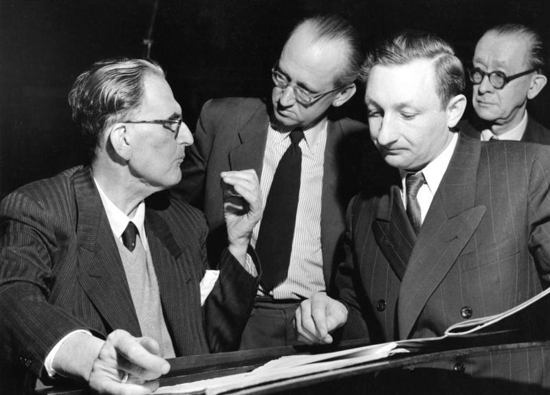 Funkhaus Köln: Dirigent Prof. Dr. Klemperer während einer Besprechung, die er mit einigen Mitgliedern des Sinfonie-Orchesters nach einer Probe am 2.2.1954 im großen Sendesaal des NWDR Köln führte. Auf dem Bild von links nach rechts: Prof. Dr. Klemperer, Dr. Krudtke (ehemaliger Assistent von Prof. Klemperer) ist Redaktionsmitglied der Musikabteilung des Funkhauses, ein Mitglied des Orchesters und im Hindergrund Tonmeister Schulze-Ritter.